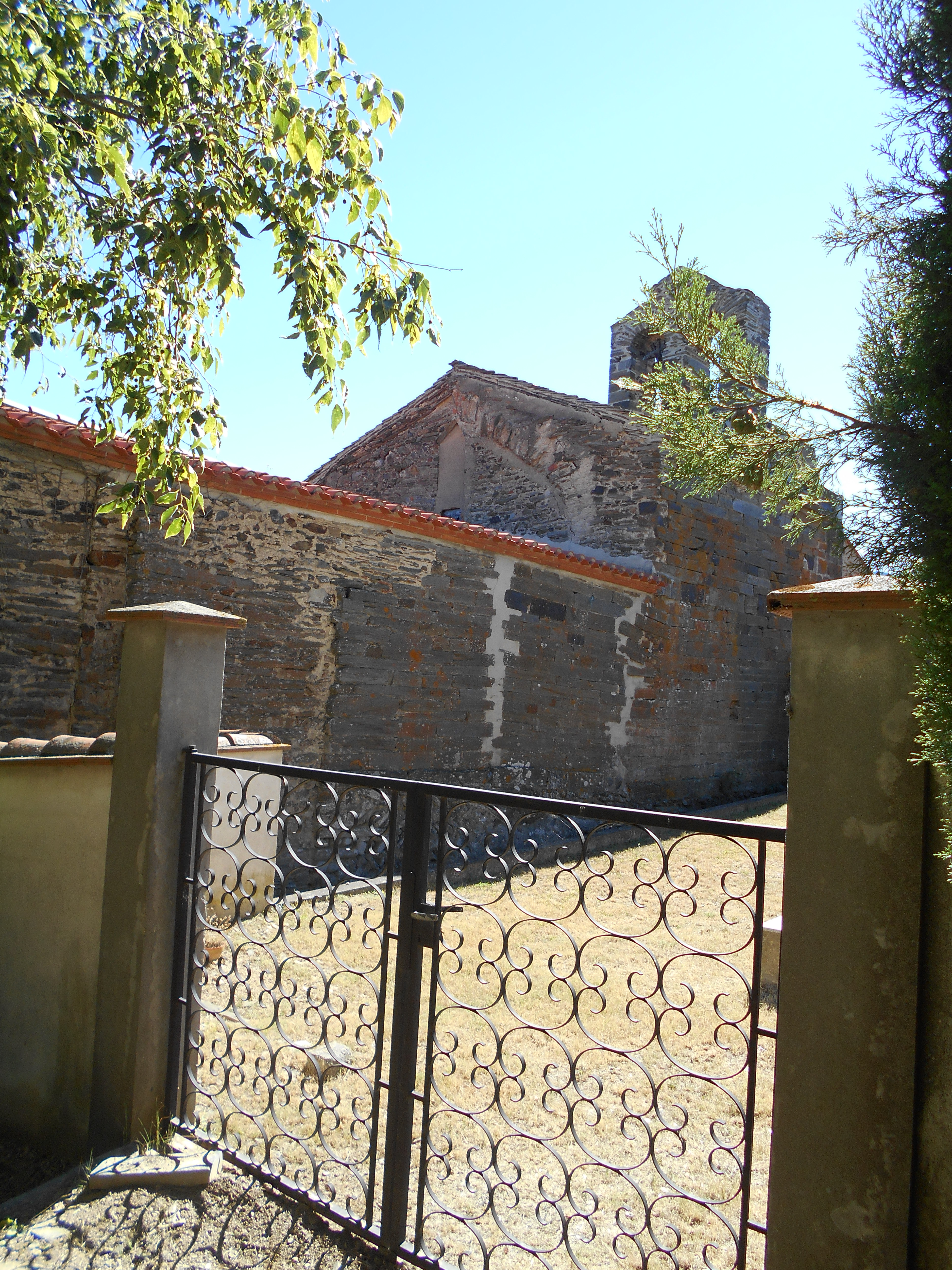 Imatge de l'església amb el cementiri nou